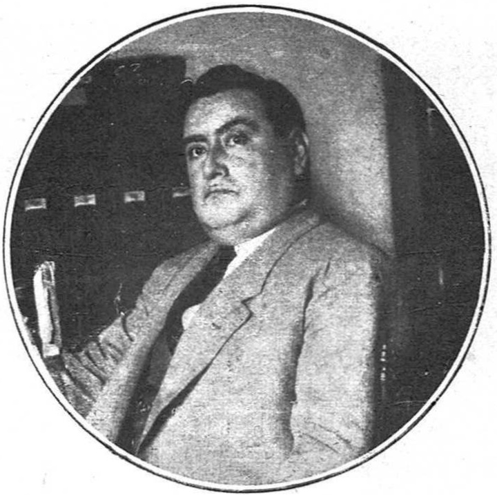 Prof. Soriano Romero fue el 13° gobernador interino del Territorio Nacional de Misiones -hoy Provincia de Misiones-, del 1° de diciembre de 1916 al 23 de mayo de 1917.